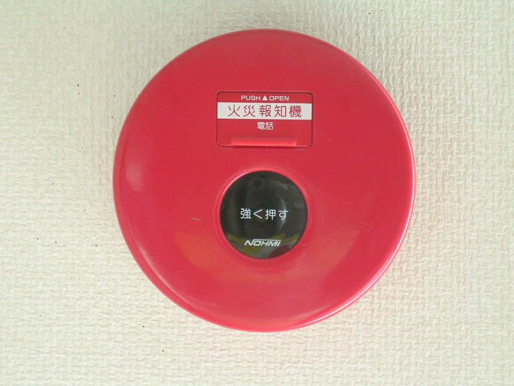 P型1級発信機（能美防災製 FMM120A型）